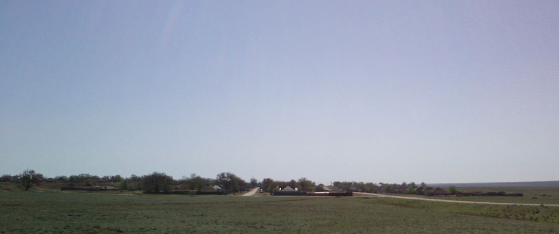 Калмыкия, Целинный район